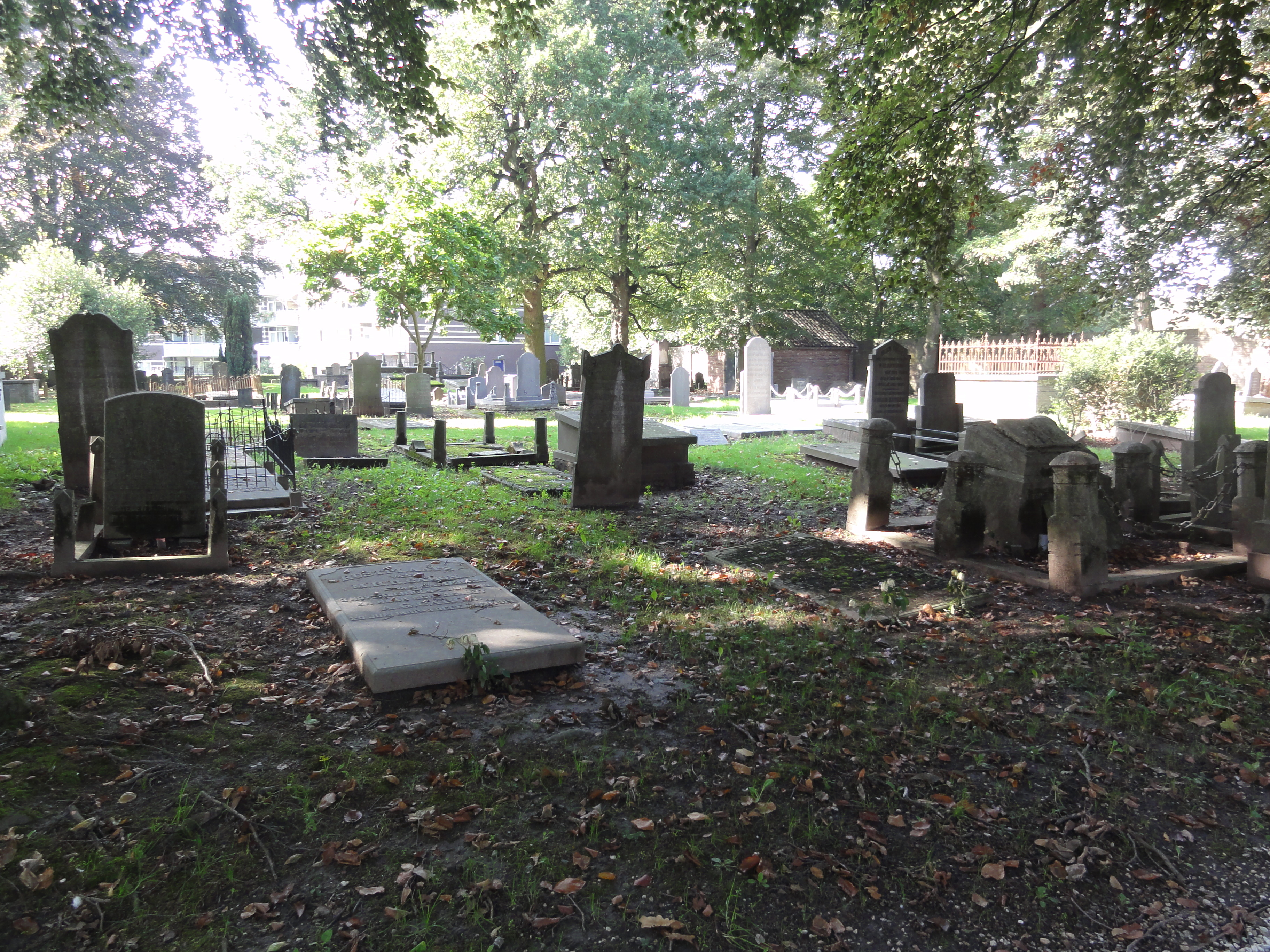 Tiel Rijksmonument 35582 begraafplaats "Ter Navolging", algemeen 49″ N, 5° 54′ 21.17″ E